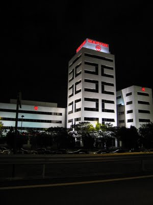 Torre Mapfre Sevilla